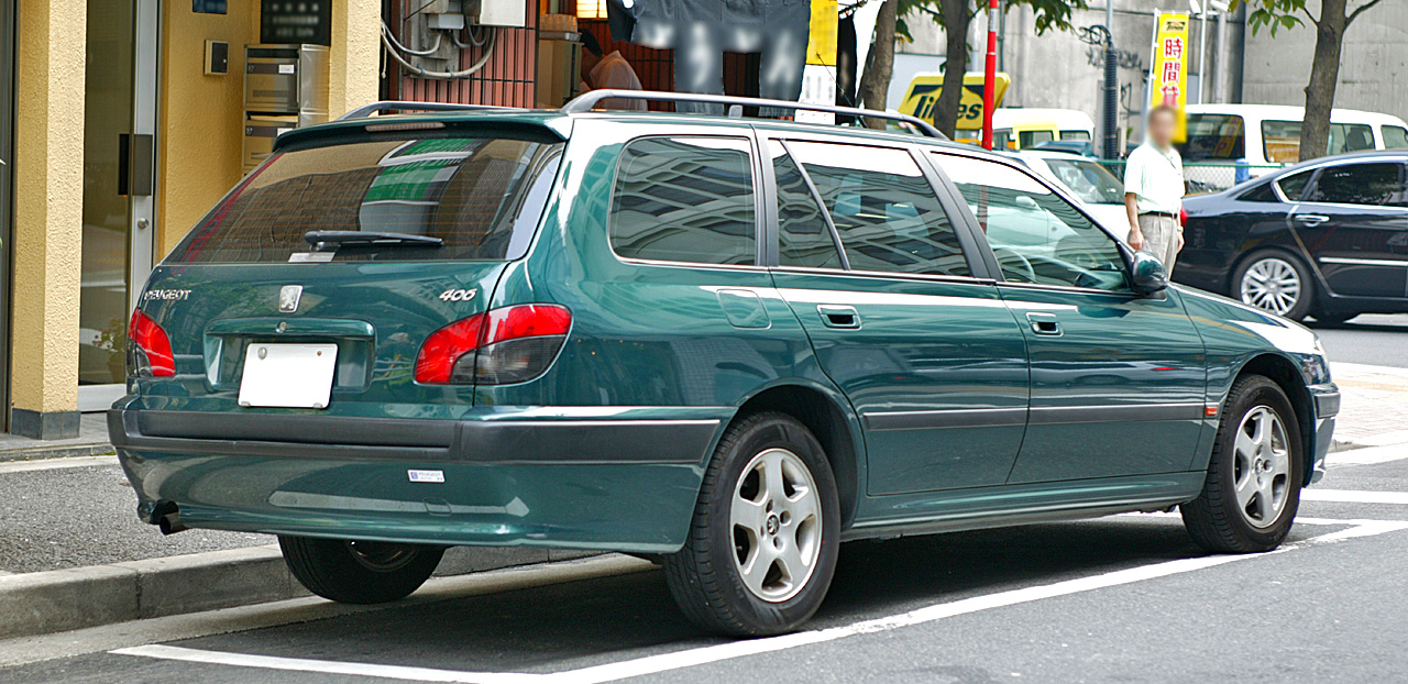 Peugeot 406 Break 2.2